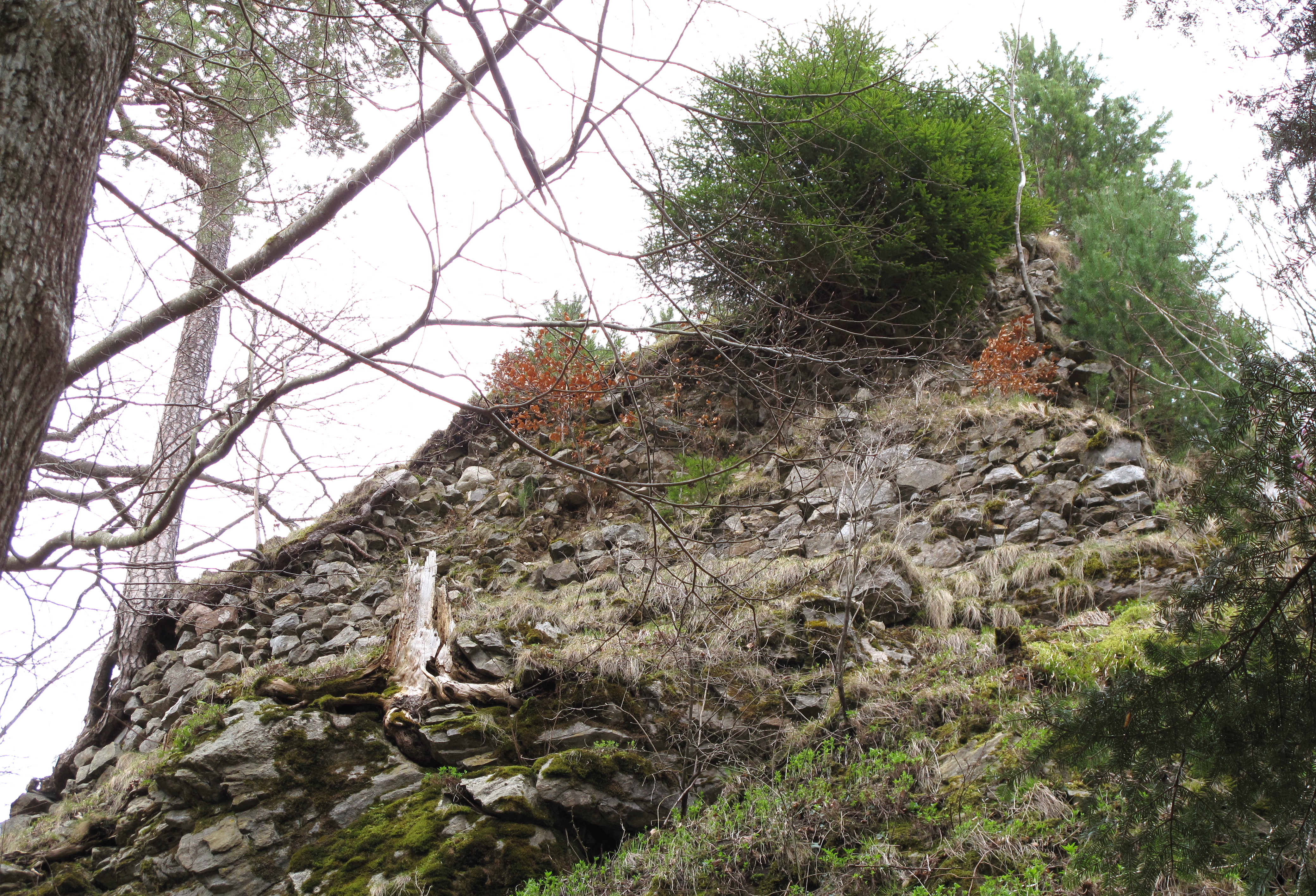 Neben nicht geringen Teilen der Fundamente hat sich vom Bergfried, oder Donjon im wesentlichen ein großer mit Gras, Moos, Dornensträucher und Bäumen überwachsener Steinhaufen erhalten.